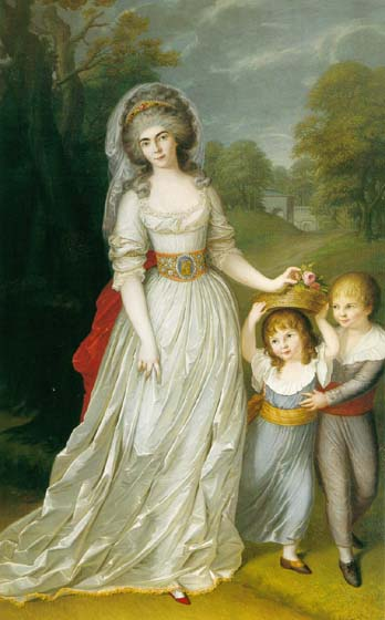 Portrait-Gemälde der Hessen-Darmstädtische Prinzessin Auguste Wilhelmine Maria (1765-1796) und Gemahlin von Maximilian I. Joseph (Bayern) mit Kindern